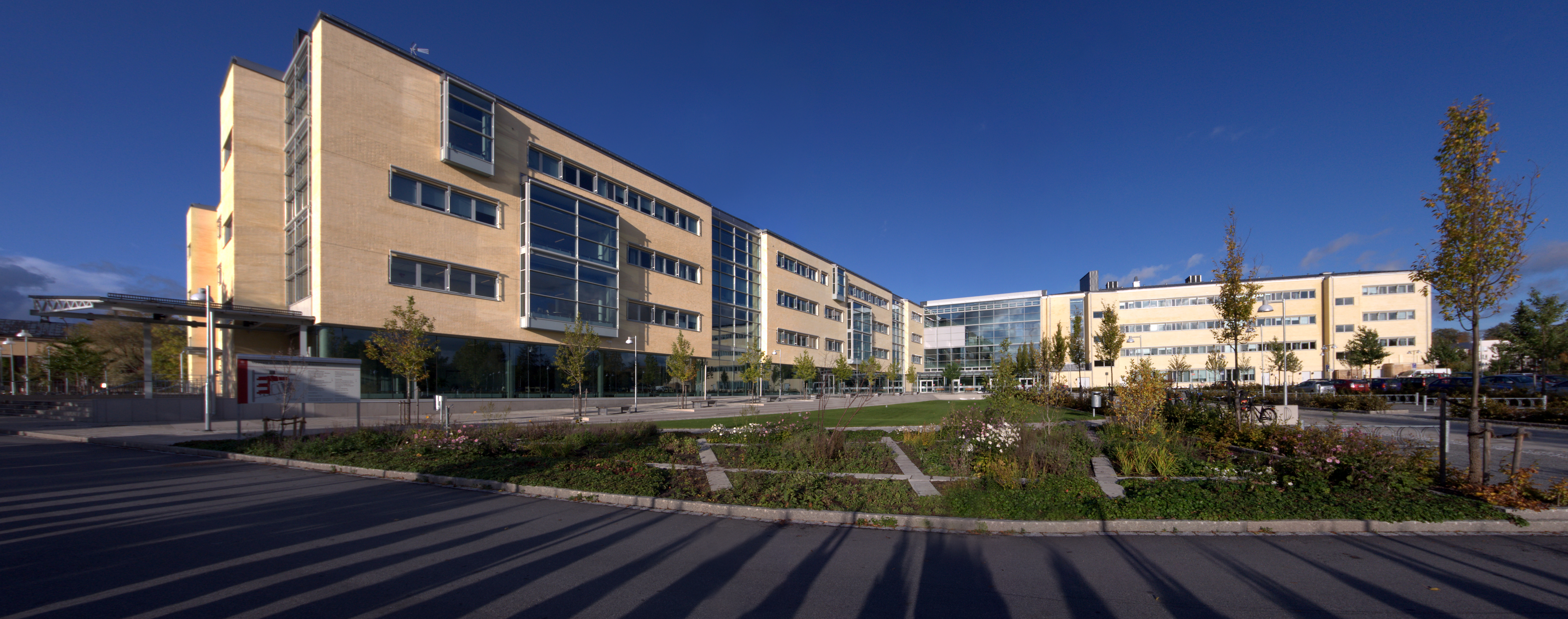 Campus Blåsenhus vid Uppsala universitet. Panoramic stitch from six frames.